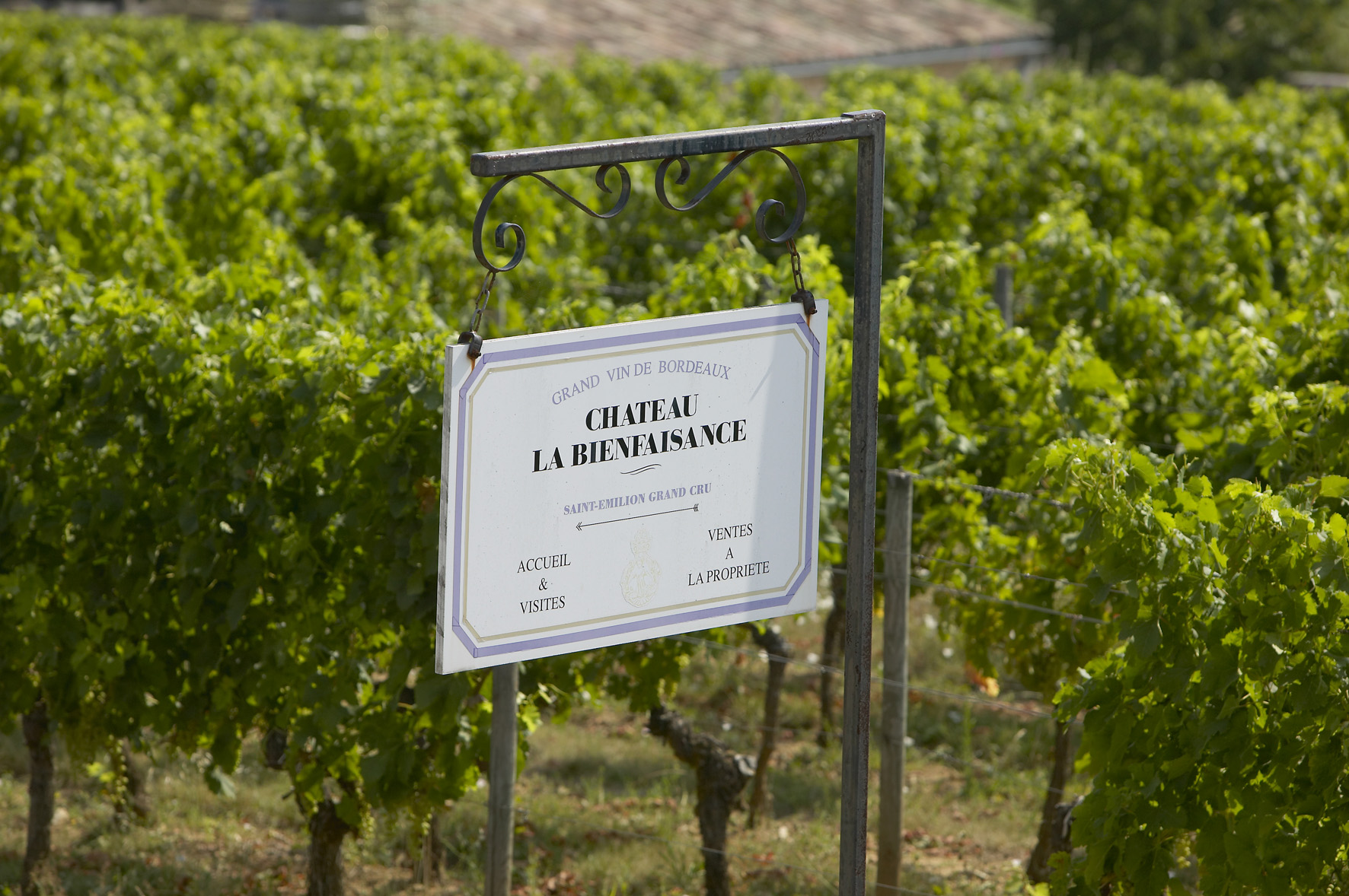 Château La Bienfaisance - entrée